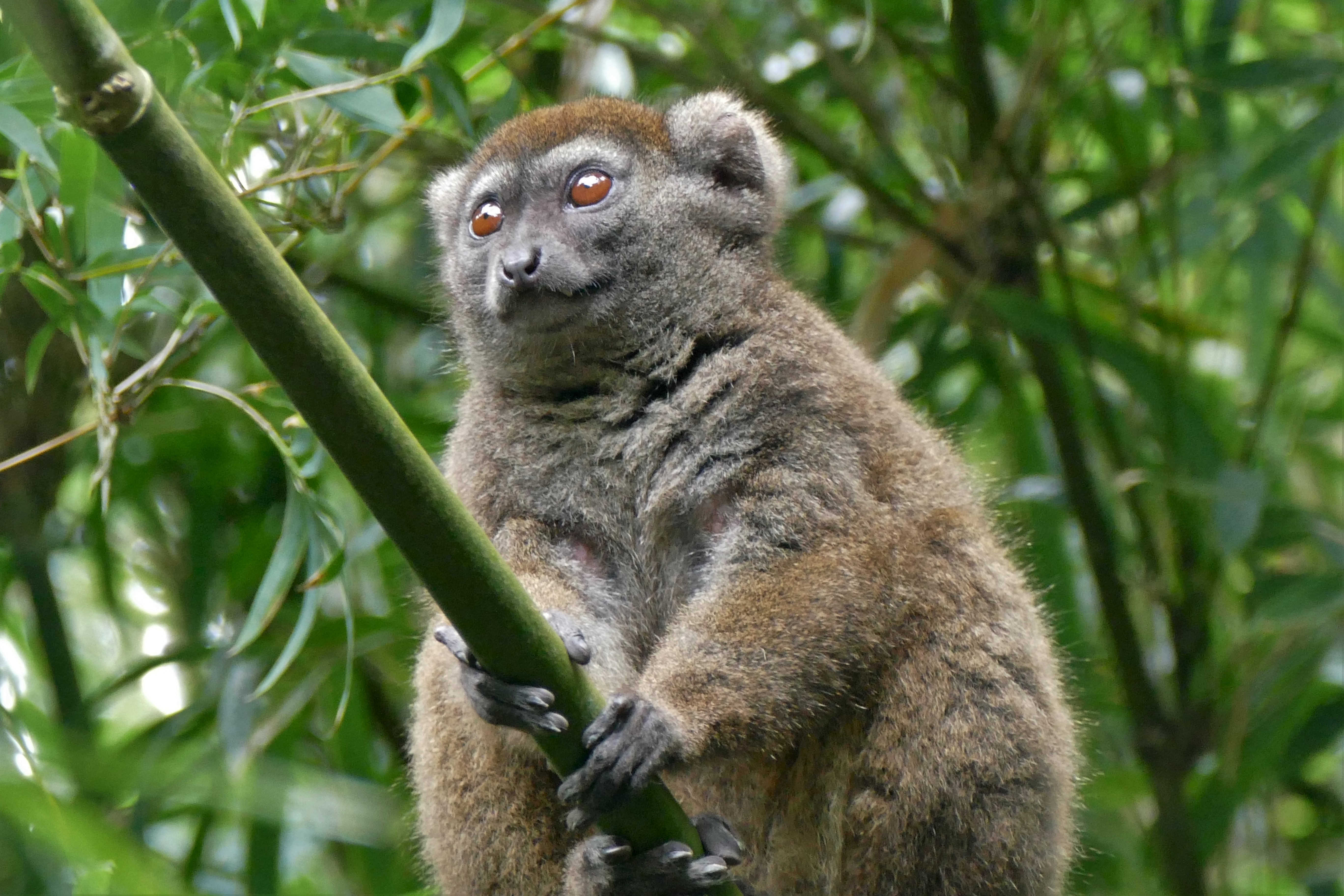 Foto, Reserve de nahampoana, Madagaskar